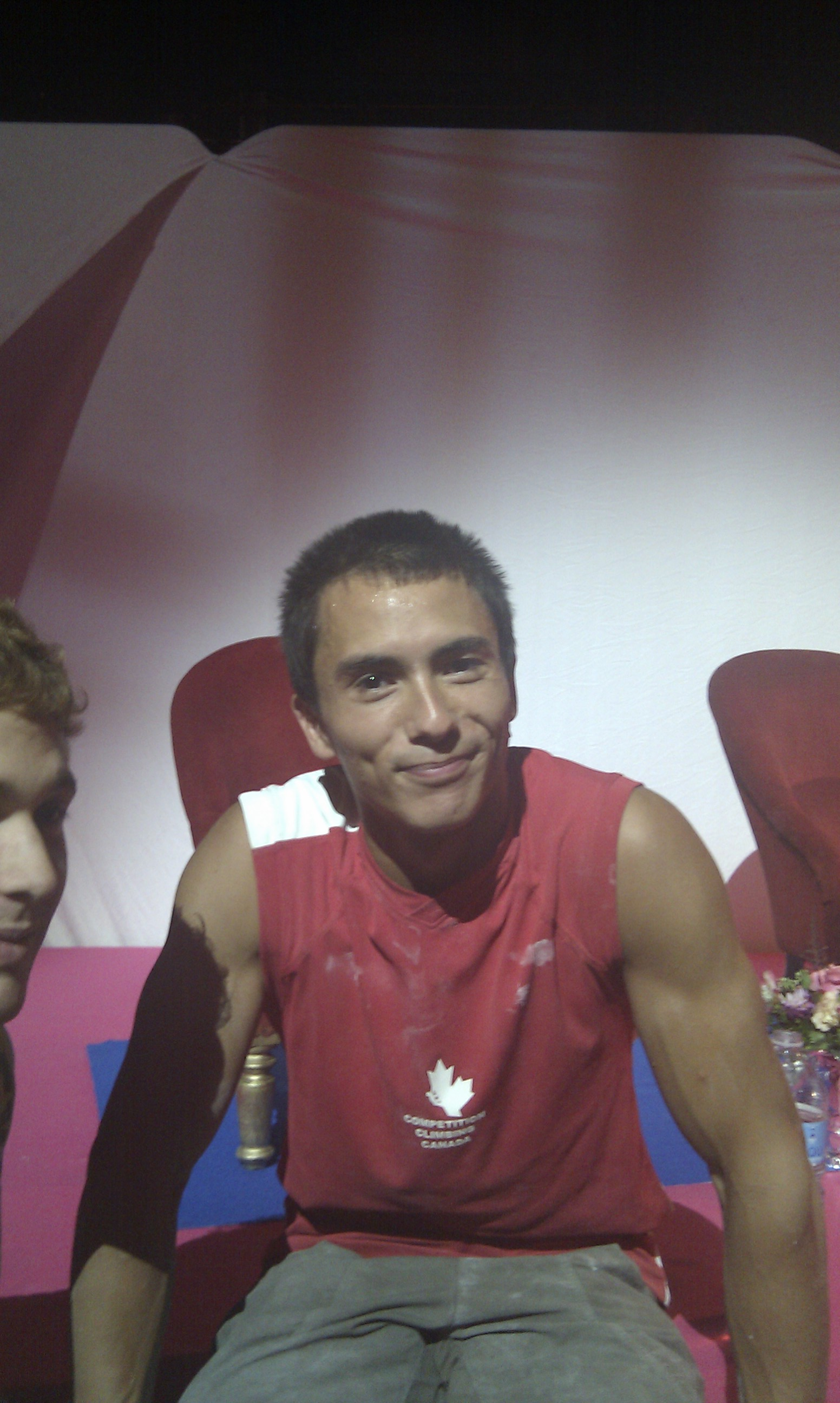 Sean McColl pris en photo par des fans lors des championnats du monde au Palais Omnisport de Paris Bercy en septembre 2012.